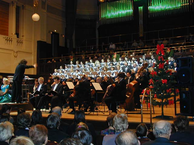 Na obrázku je koncert Bambini di Praga v Obecním domě Je to moje vlastní fotka PD-self